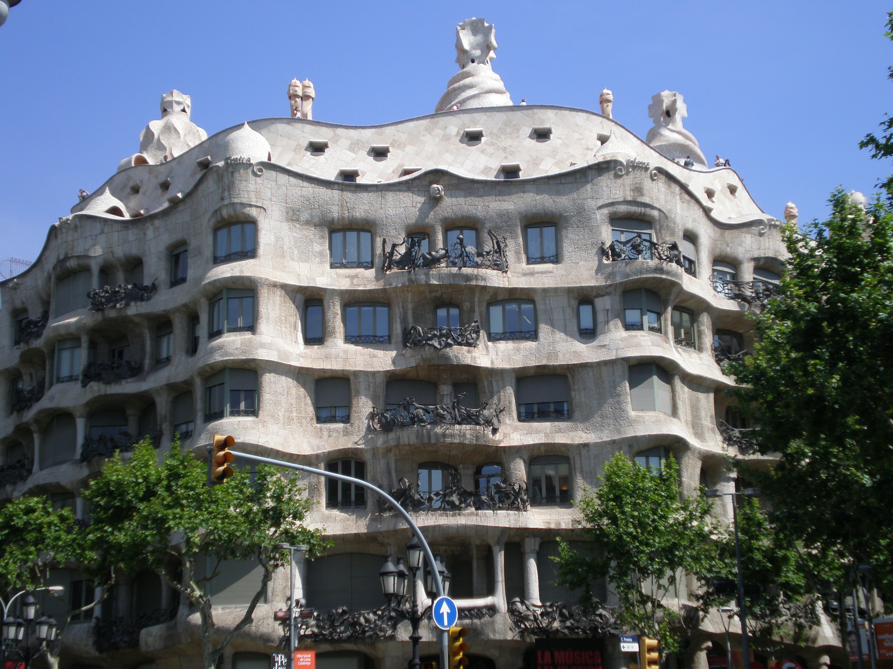 Casa Milà (Barcelona)